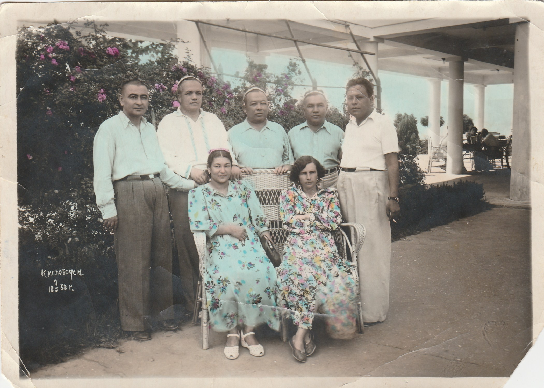 Oʻzbekcha/ўзбекча: Bogoutdion A.M.( o'ngdan birinchi), rafiqasi ( o'ngdan birinchi) hamda yaqin do'stlari bilan 1968 yil